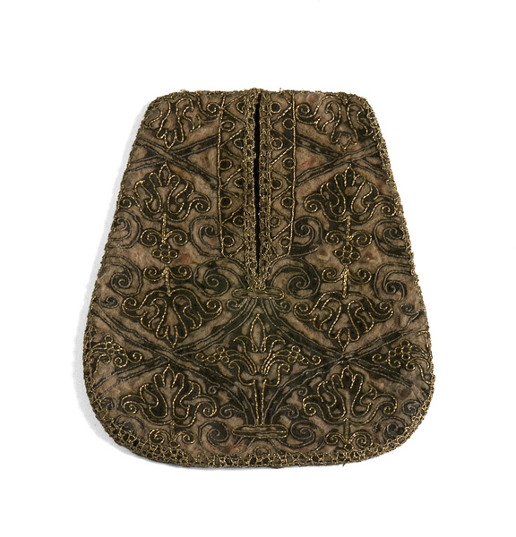 Faltriquera. Faltriquera de seda, lana y metal, color grana con oro y plata.